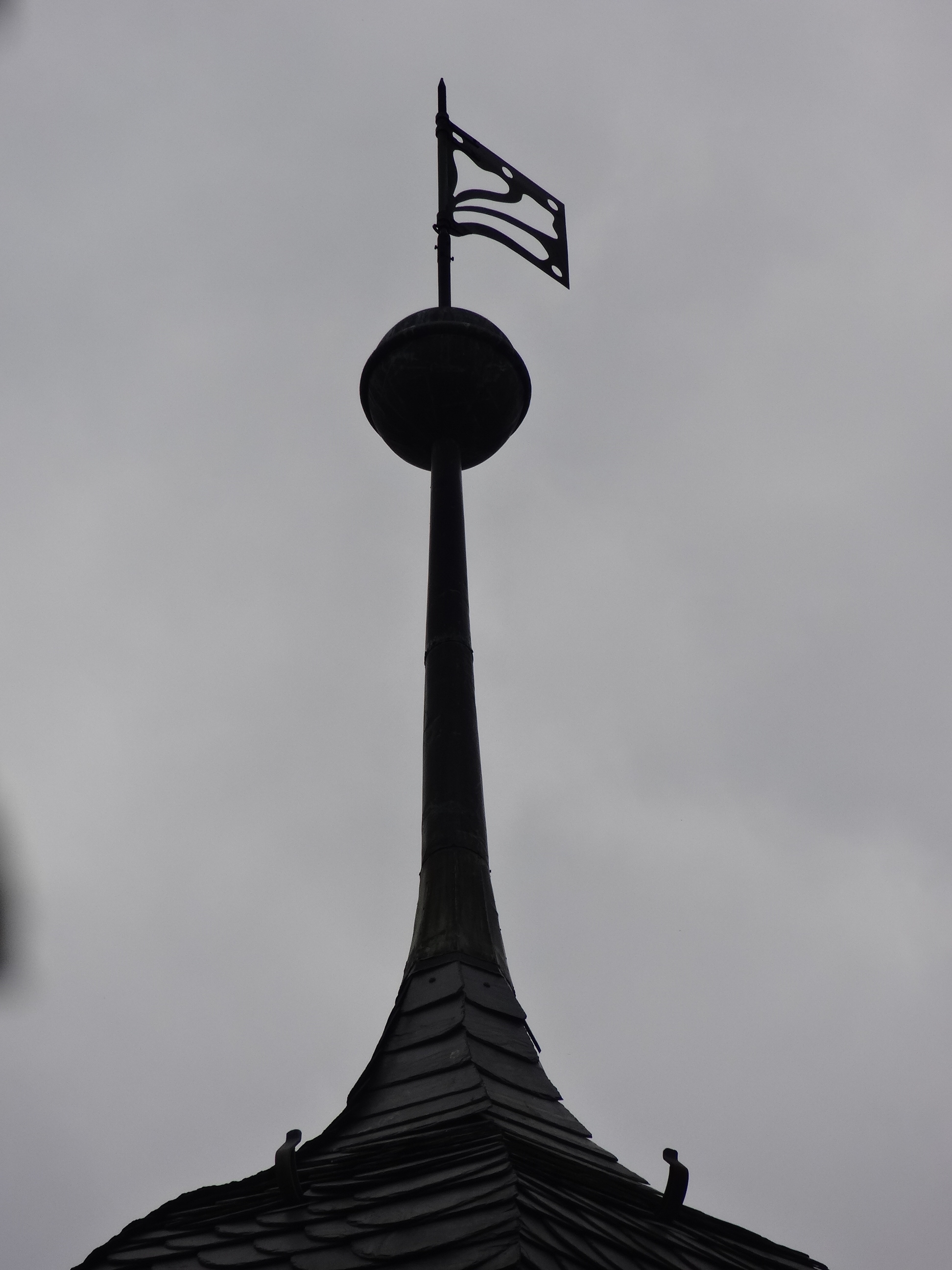 Haus Haardteck, Herdweg 79 in Darmstadt